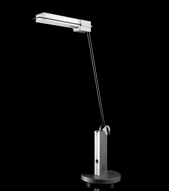 Artemide Alistro Lamp